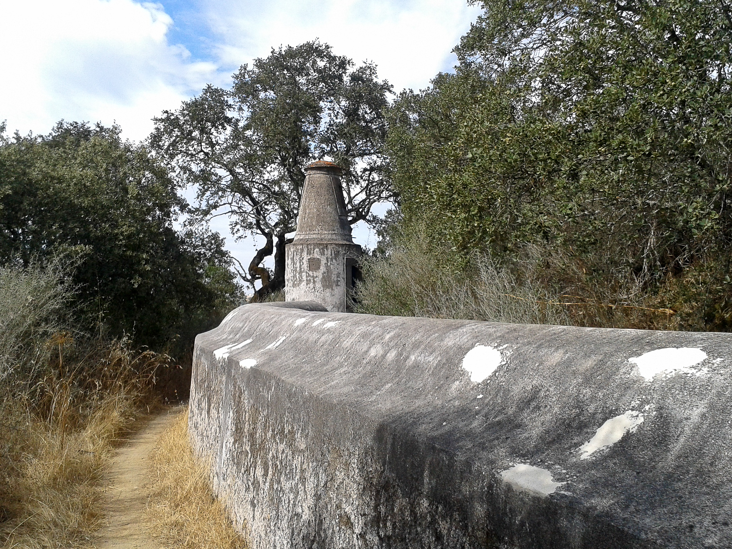 Aqueduto da Água da Prata. Na fotografia vê-se parte do cano que sofreu restauros e melhoramentos na estrutura em obras realizadas no século XIX. Ao fundo pode ver-se uma das caixas cilíndricas com pequenas torres cónicas que serviam para ventilação e que foram introduzidas nessas mesmas obras.